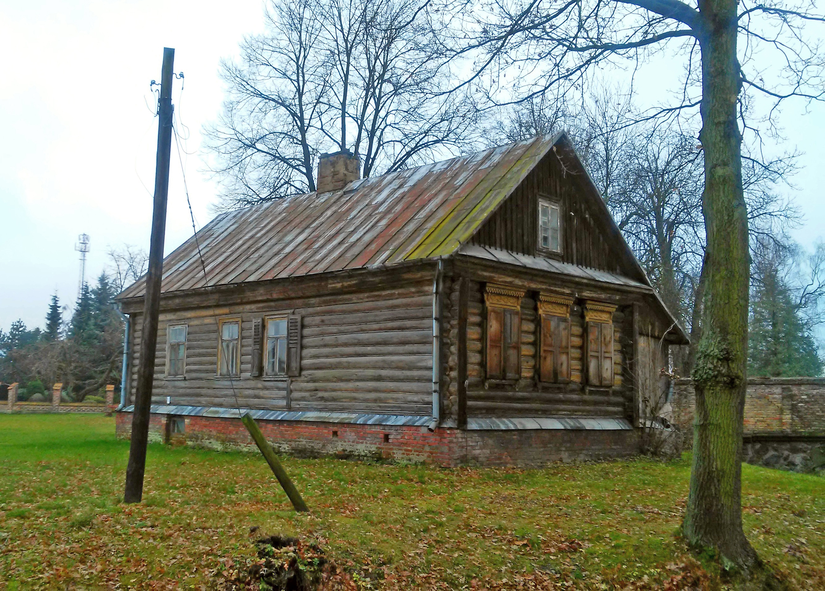 Dom przełożonej monasteru Narodzenia Matki Bożej w Leśnej Podlaskiej, tradycyjnie nazywany "Domem Ksieni", obecnie nieużytkowany